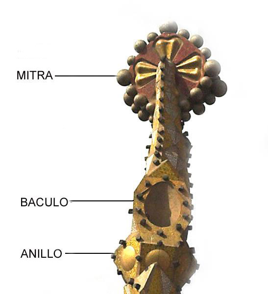 Pináculo de una de las torres de los Apóstoles de la Sagrada Familia, simbolizando los atributos episcopales: mitra, báculo y anillo.